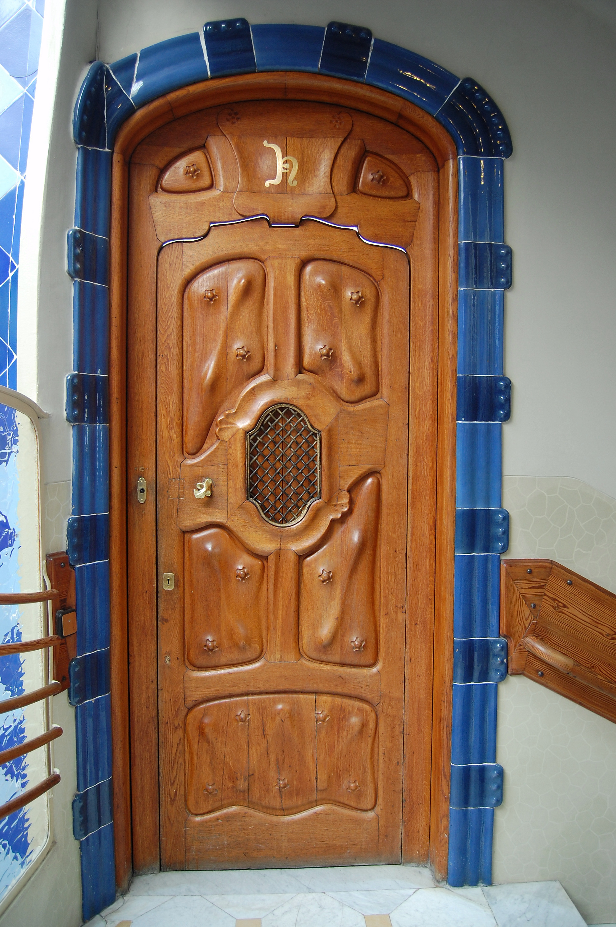 Casa Batlló - Barcellona Antoni Gaudi